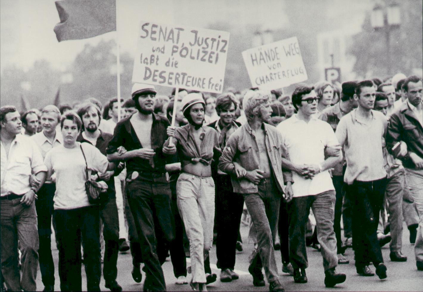 Berlin-West war nach dem Alliierten Status entmilitarisiert. Nur Militär der Siegermächte (Sowjetunion, Frankreich, Britannien, USA) hatten militärische Präsenz in Berlin. Trotzdem wurden im Rahmen der Amtshilfe Deserteure aus Westdeutschland in West-Berlin nach West-Deutschland überführt... bis 1969. Es wurden Flugzeuge extra gechartert.